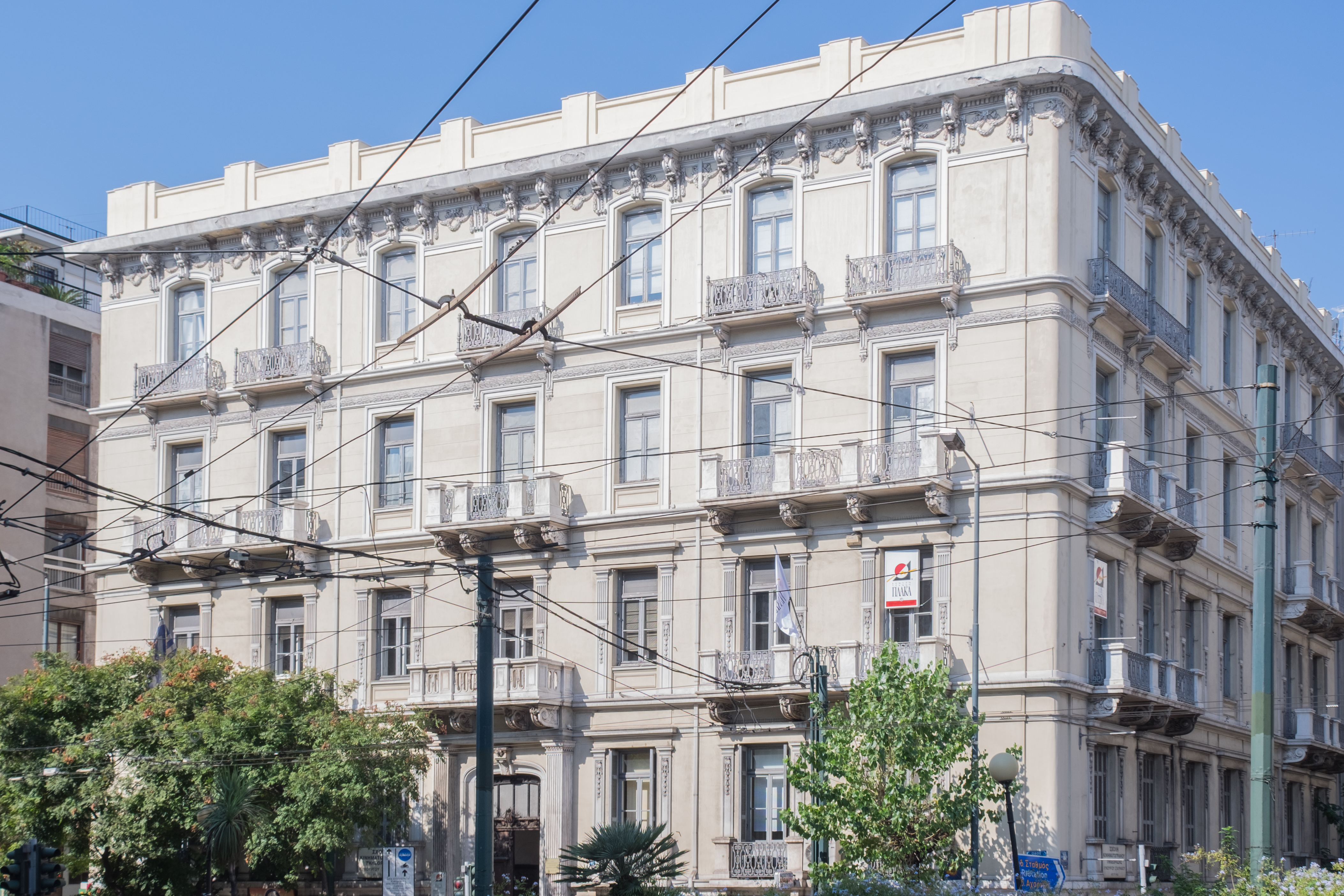 Μέγαρο Ησαΐα«Μέγαρο Ησαΐα»